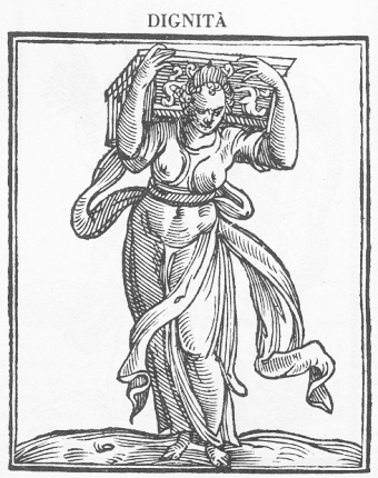 切萨雷马的“ Iconologia ”木刻。显示尊严的寓言 凯撒·瑞帕的 "Iconologia"木雕。寓意人性的尊严